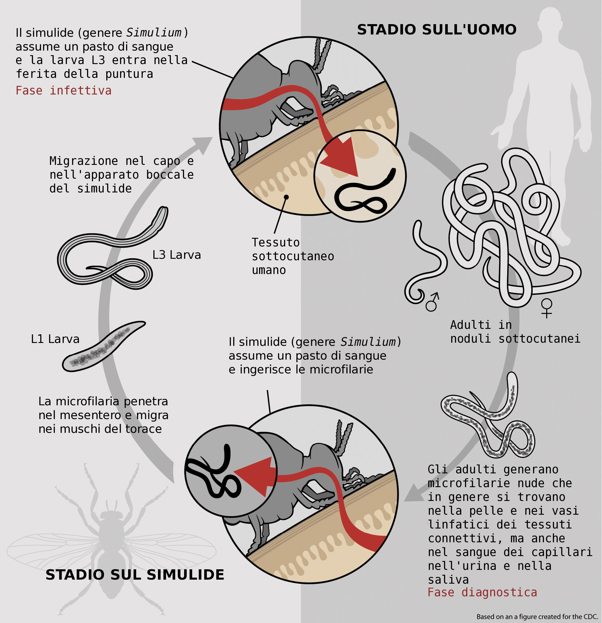 Ciclo biologico di Onchocerca volvulus, un nematode parassita che causa l'oncocercosi o cecità fluviale